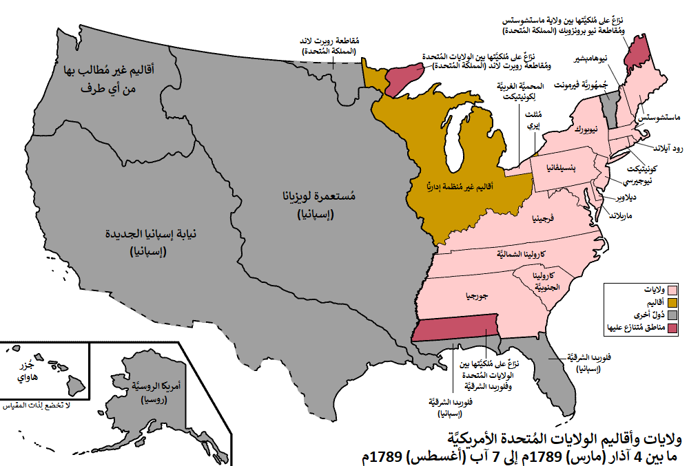 خريطة الولايات والأقاليم الأمريكيَّة كما كانت ما بين شهر آذار (مارس) 1789 إلى شهر آب (أغسطس) 1789. يوم 4 آذار (مارس) 1987، صُدِّق على دُستُور الولايات المُتحدة، على أنَّ بعض الولايات لم يُوقِّع مبعوثيها عليه، فلم تنضم إلى الاتحاد مُباشرةً؛ لكن في سبيل تبسيط هذه الخريطة، فإنَّ تلك الولايات أُضيفت بِجميع الأحوال. وبِتاريخ 7 آب (أغسطس) 1789، نُظِّمت الأقاليم الواقعة شمال غرب نهر أوهايو تنظيمًا إداريًّا.